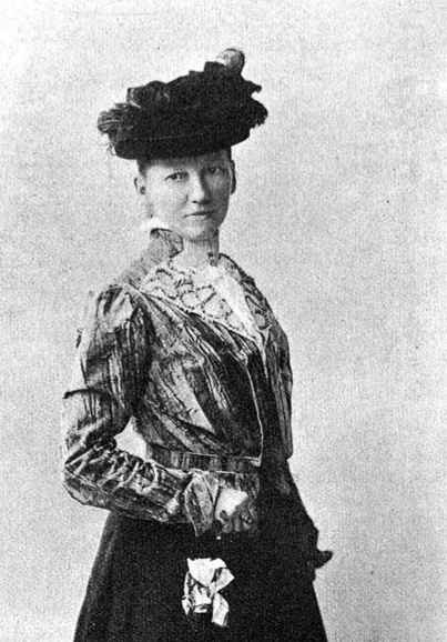 (1885) Nanni von Escher (1855–1932) Schriftstellerin. Foto von R.Ganz, Zürich